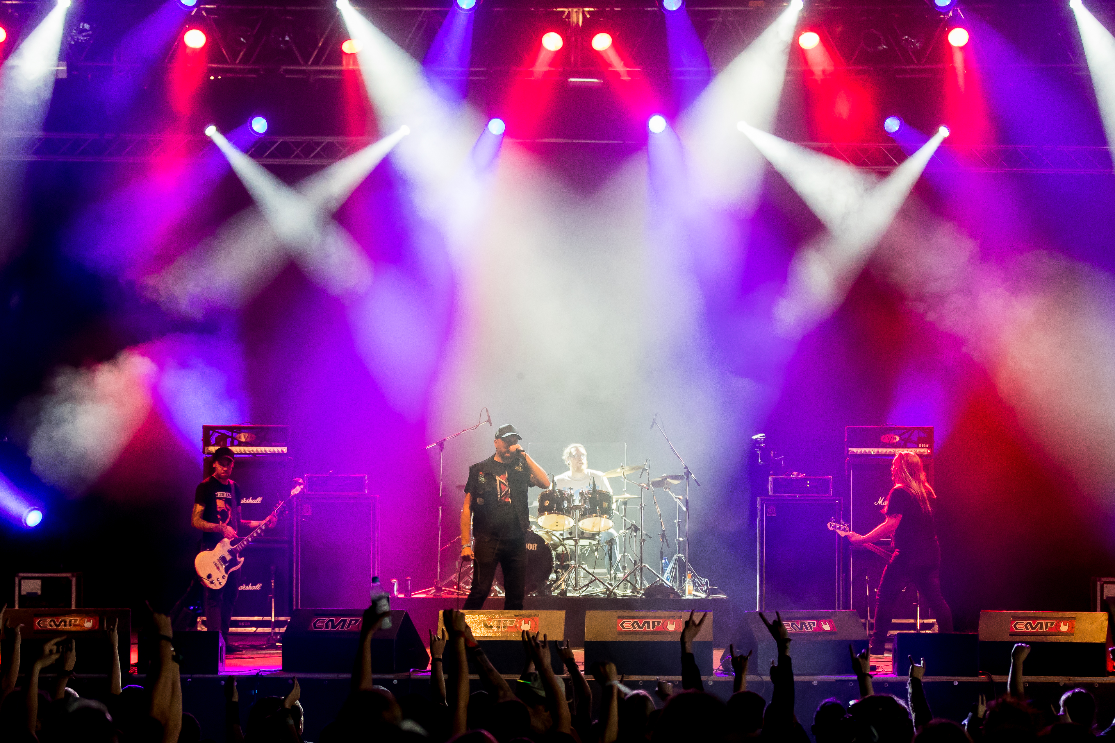 Rotten Sound during Summer Breeze 2016 at , Dinkelsbühl, Bayern, Germany on 2016-08-20, Photo: Sven Mandel